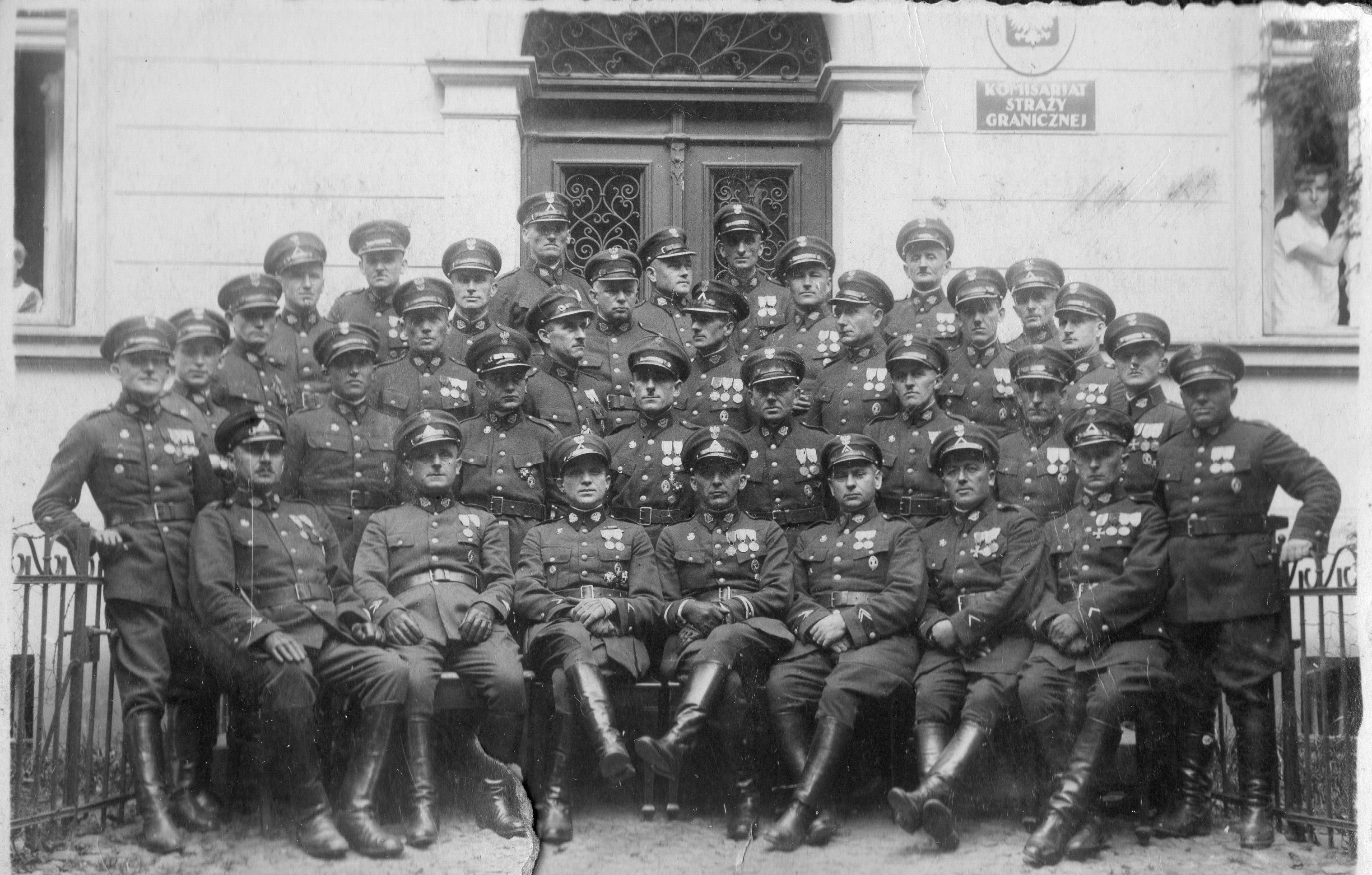 Fot. ze zbiorów Elżbiety Orzeszyńskiej.